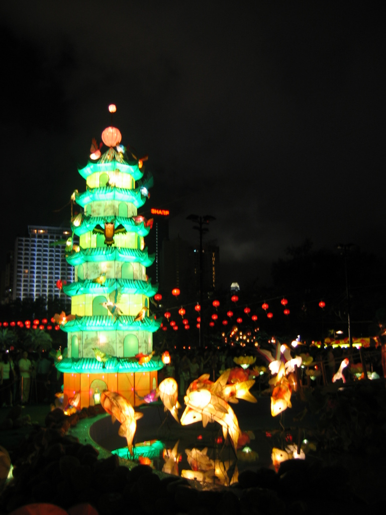 2005年香港維多利亞公園的中秋節花燈會。 由中文維基百科用戶石拍攝